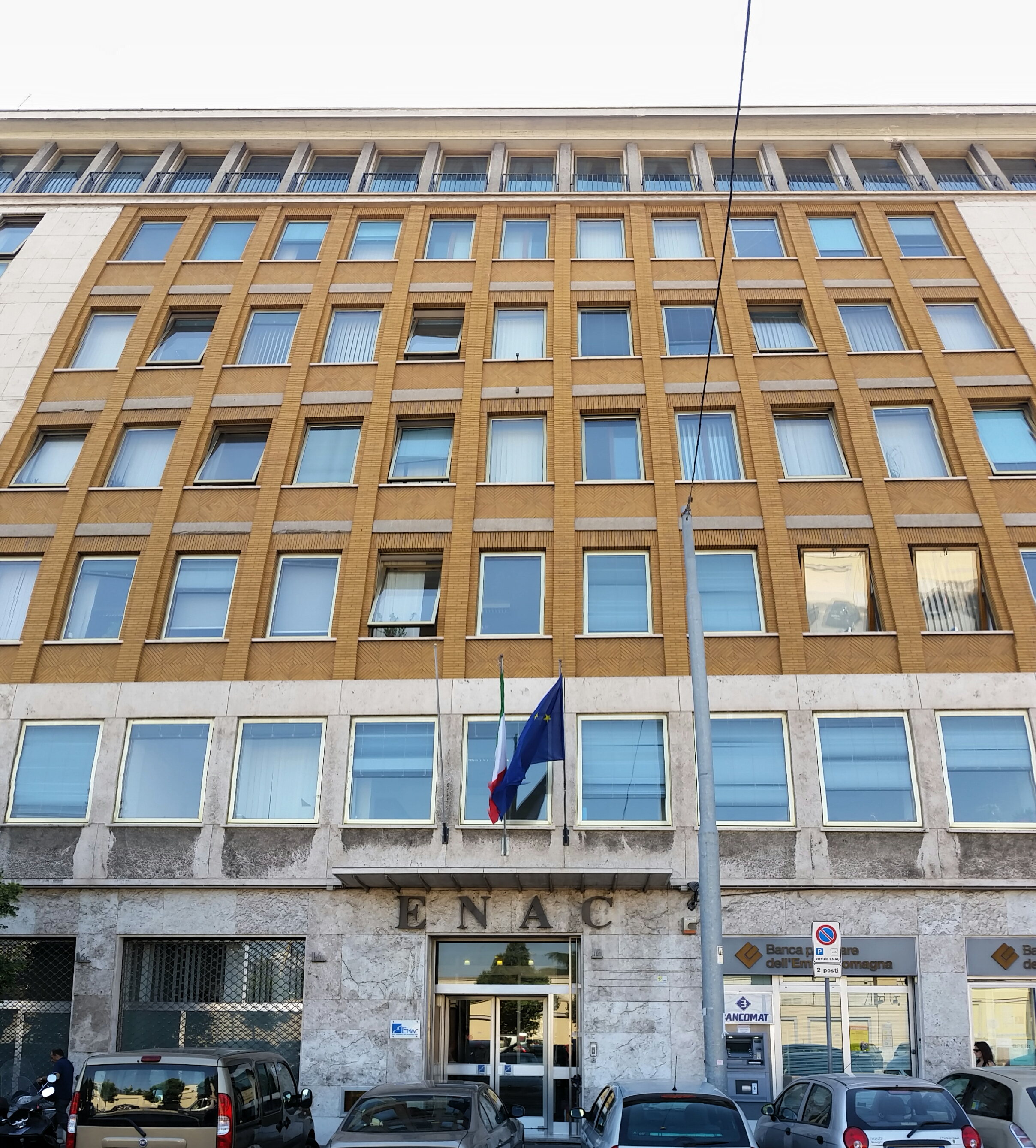 Sede principale ENAC a Roma via Gaeta